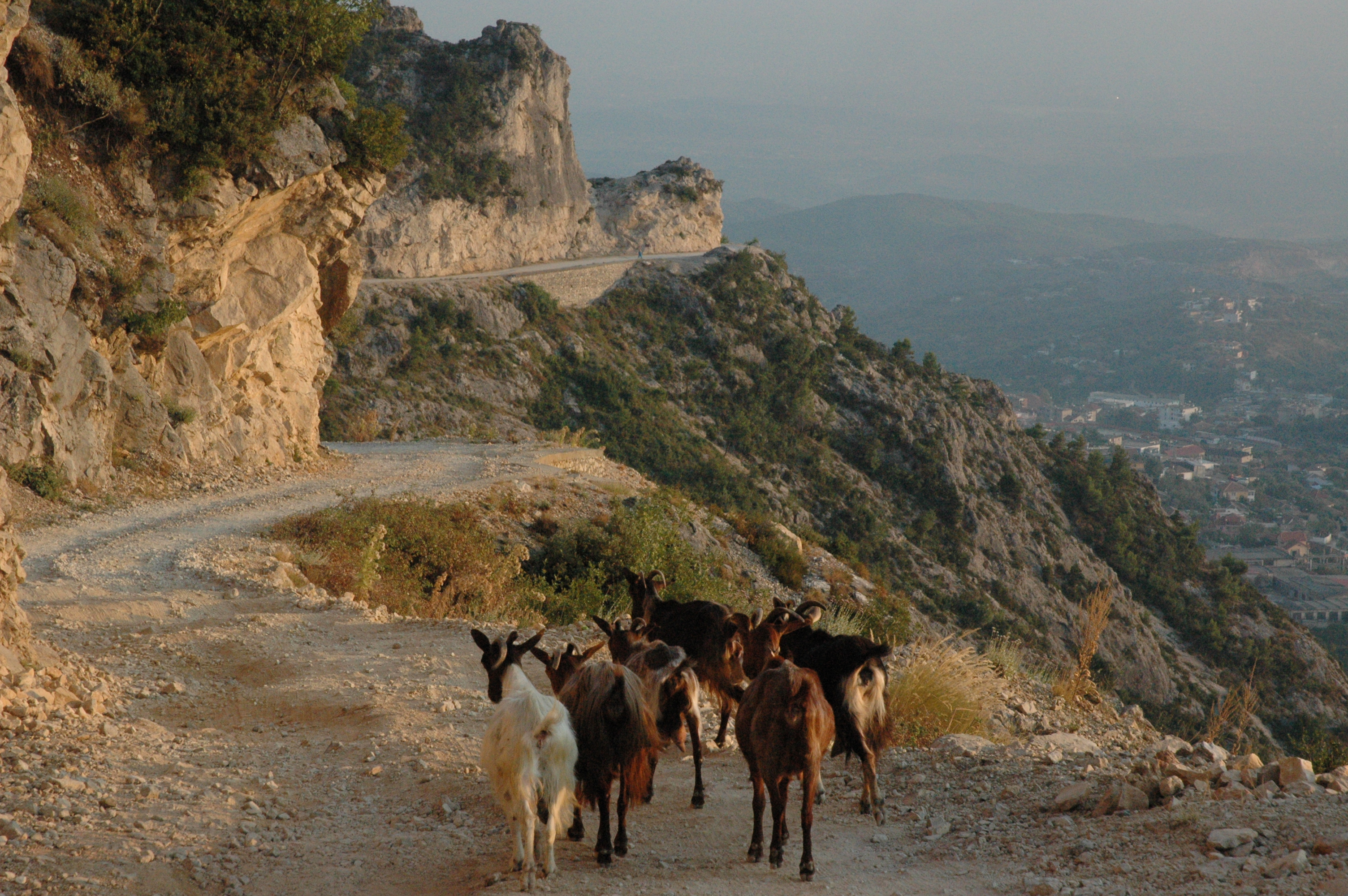 Mountain road near Kruja, Albania